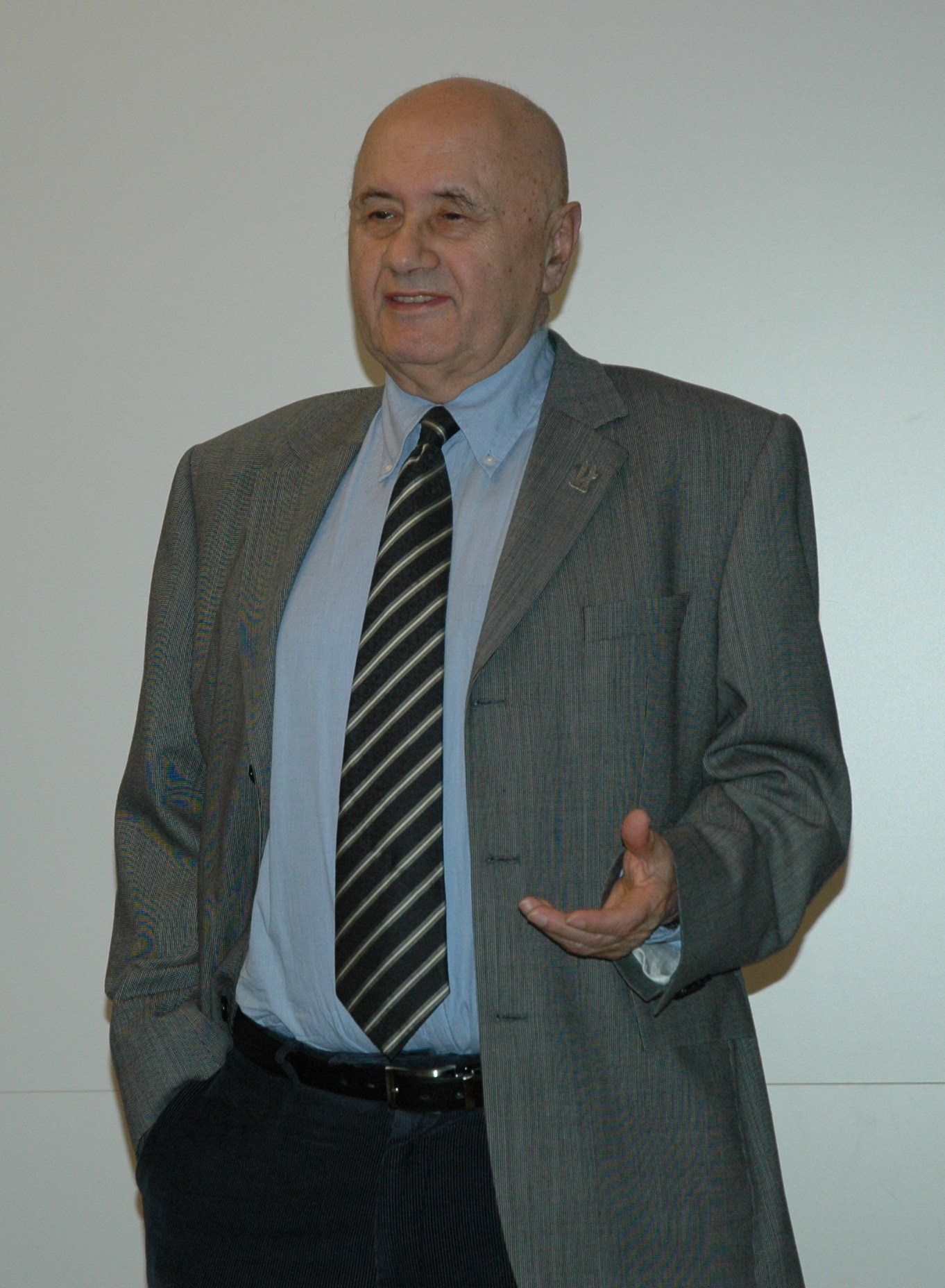 Der österreichische Journalist Karl Pfeifer (Karl Pfeifer) anlässlich einer Vorstellung des Dokumentarfilms über ihn ("Zwischen den Stühlen"), am 25. November 2008 im Dokumentationsarchiv des österreichischen Widerstand (DÖW) in Wien / Austrian Journalist Karl Pfeifer at a presentation of documentary about him at the Dokumentationsarchiv des österreichischen Widerstand (DÖW) in Vienna